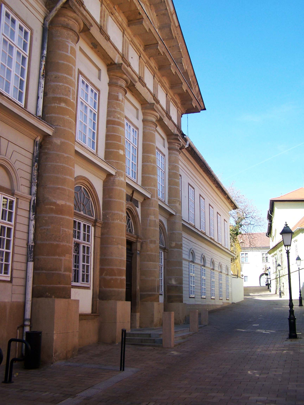 Egyetemi Könyvtár (Pécs, Szepessy Ignác utca 3.) This is a photo of a monument in Hungary. Identifier: 1809